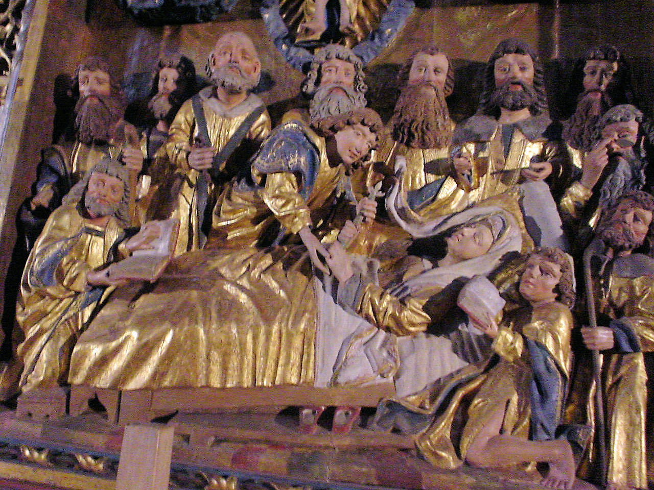 Darstellung des Marientodes. Besonders ungewöhnlich: Einer der Apostel am Bett der Toten (rechts) trägt eine Brille. Unter dem Totenbett stehen die roten Pantoffeln Marias